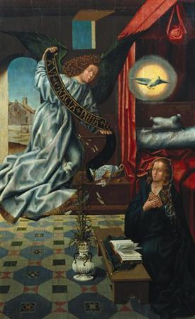 A Anunciação é um painel do Políptico da Capela-mor da Sé de Viseu, criado como os outros entre 1501 e 1506. Tendo de altura 131 cm e de largura 81 cm, a obra representa o episódio bíblico da Anunciação